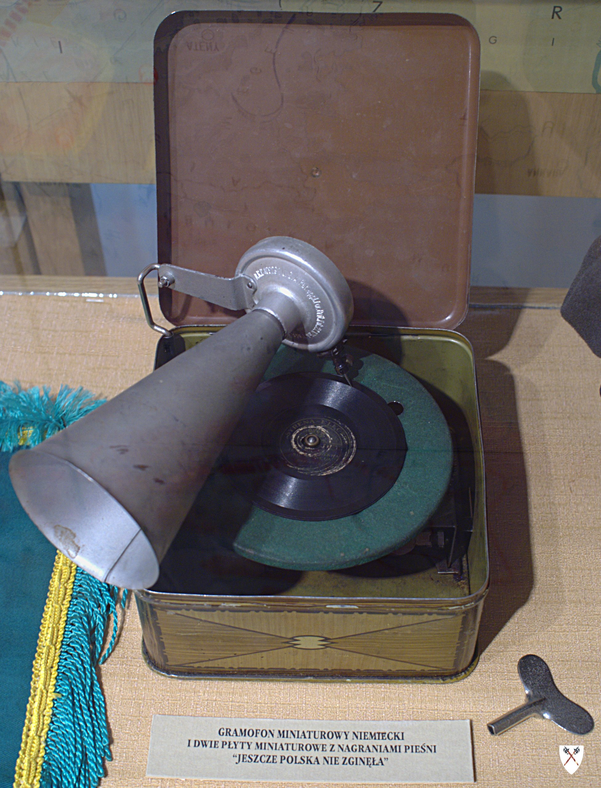 Miniaturowy gramofon z początku XX w. z dwoma płytami z nagraniem polskiego hymnu, ze zbiorów Muzeum Hymnu Narodowego w Będominie.